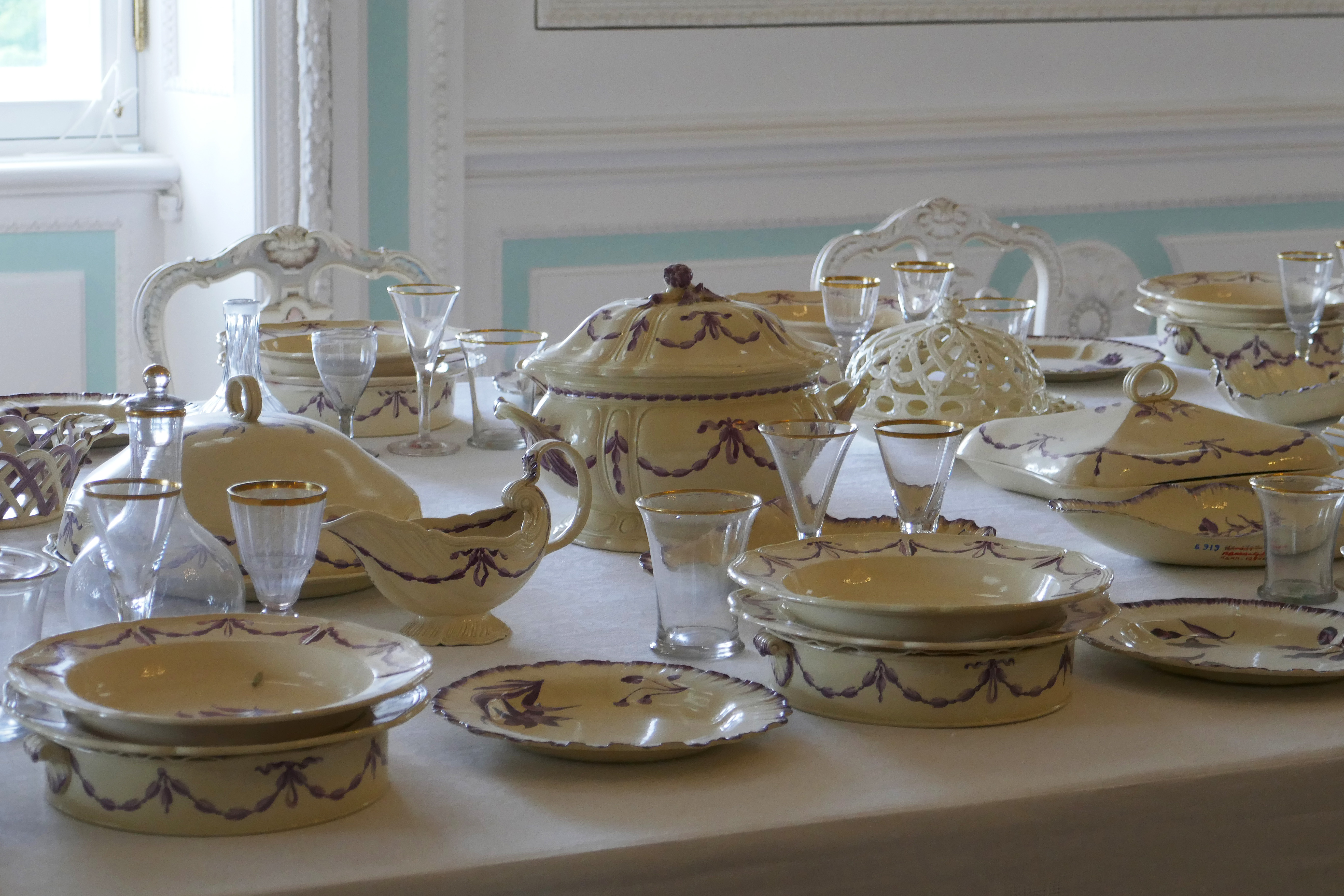 Service de table dans la grande salle à manger (Peterhof, Saint Pétersbourg).